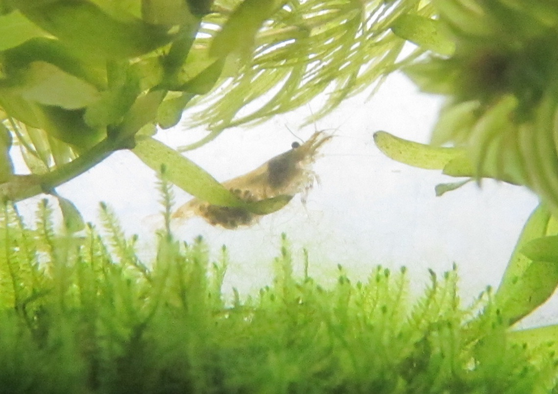 抱卵するミナミヌマエビ